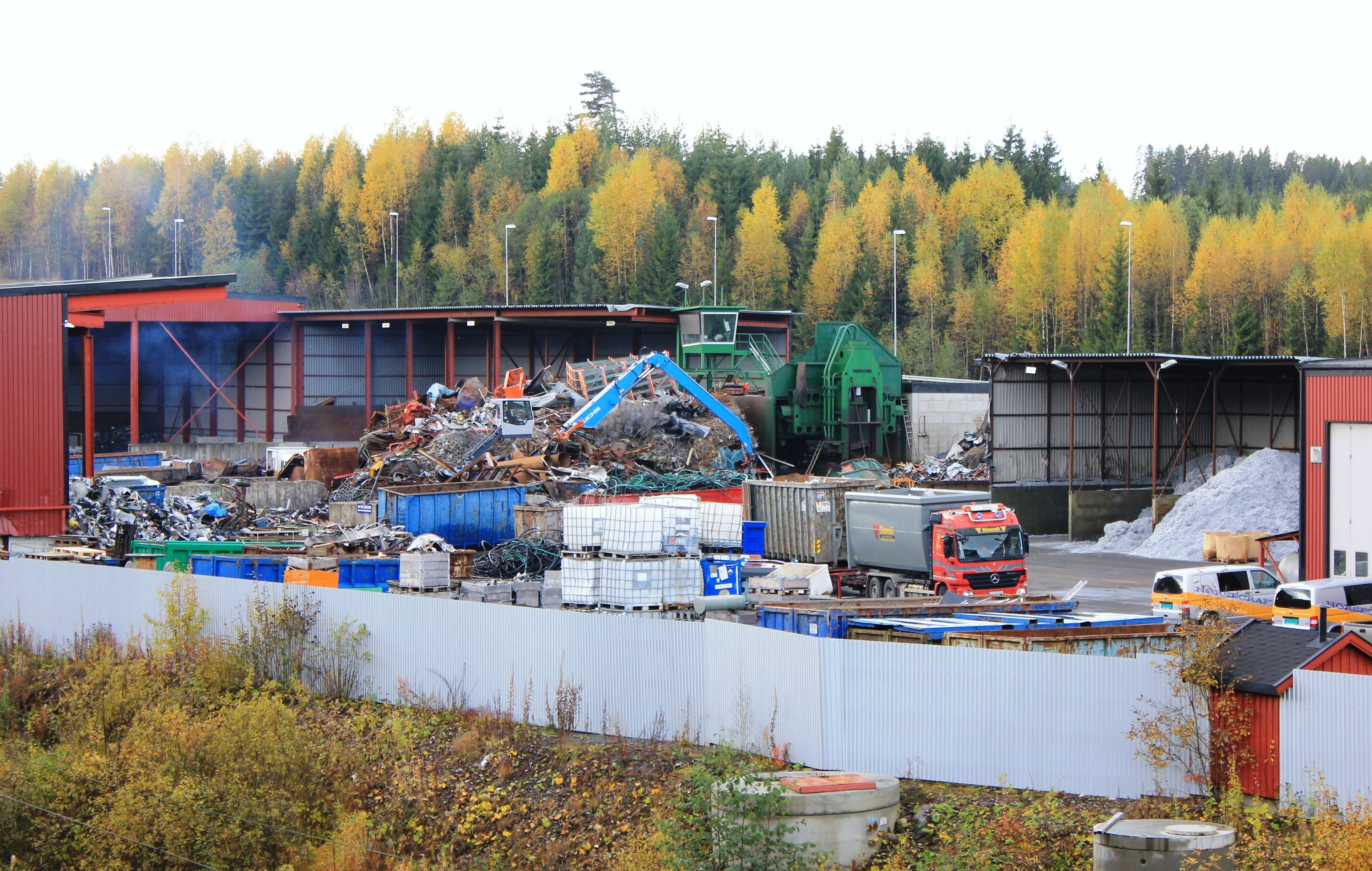 Oppland Metall på Gjøvik er en gjenvinningsbedrift.